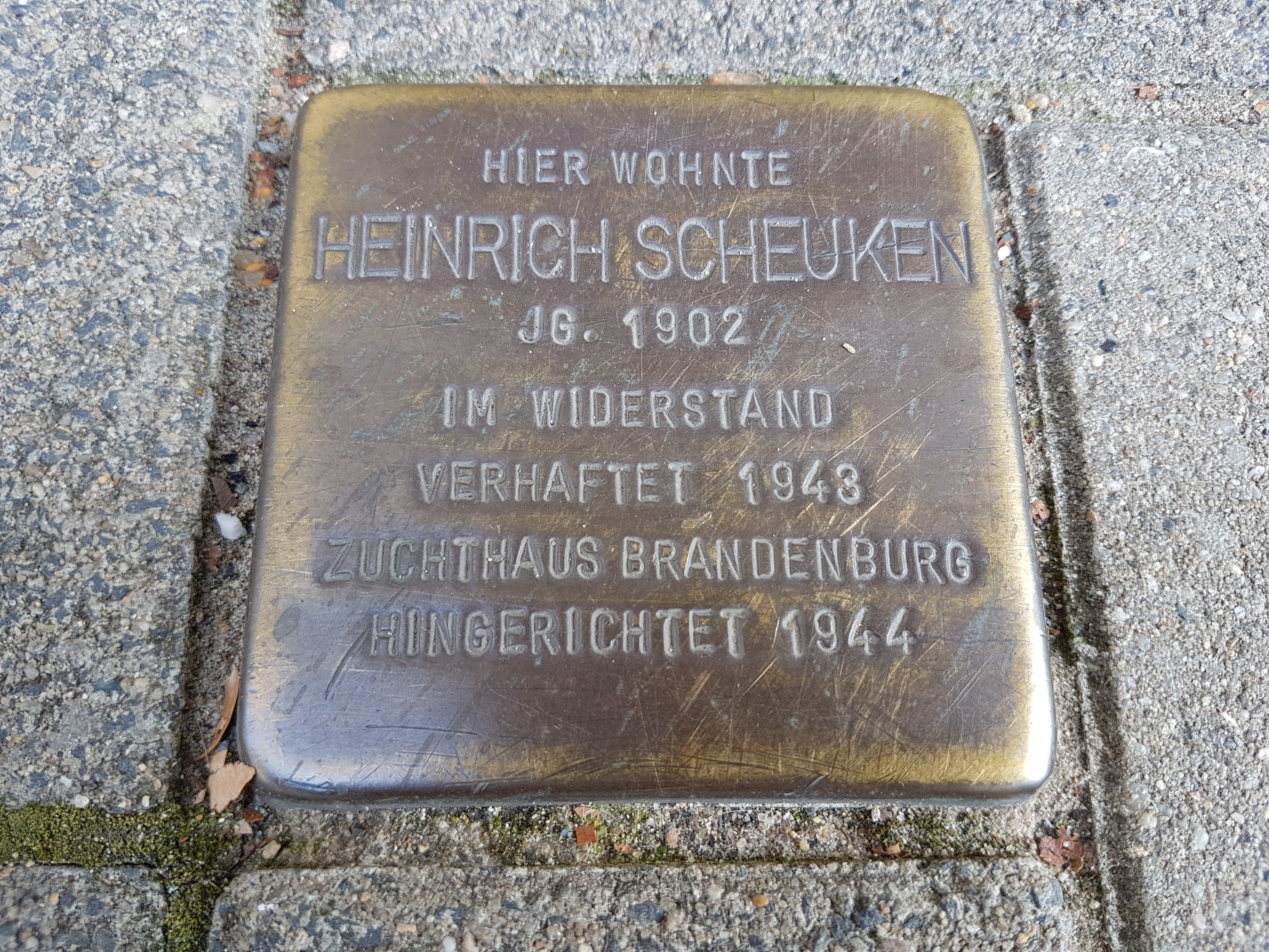 Stolperstein Duisburg Heinrich Scheuken